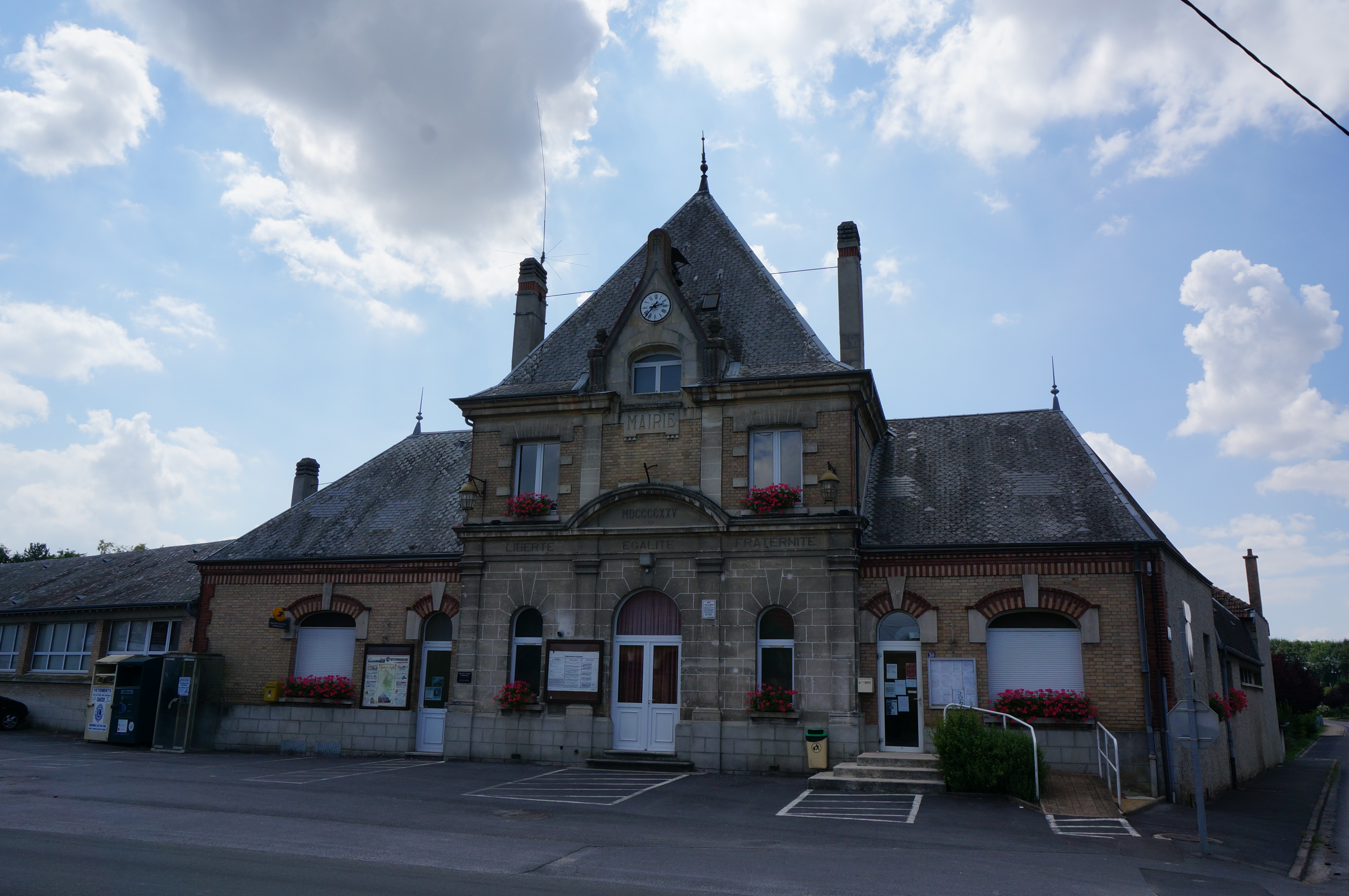 la Mairie du village.